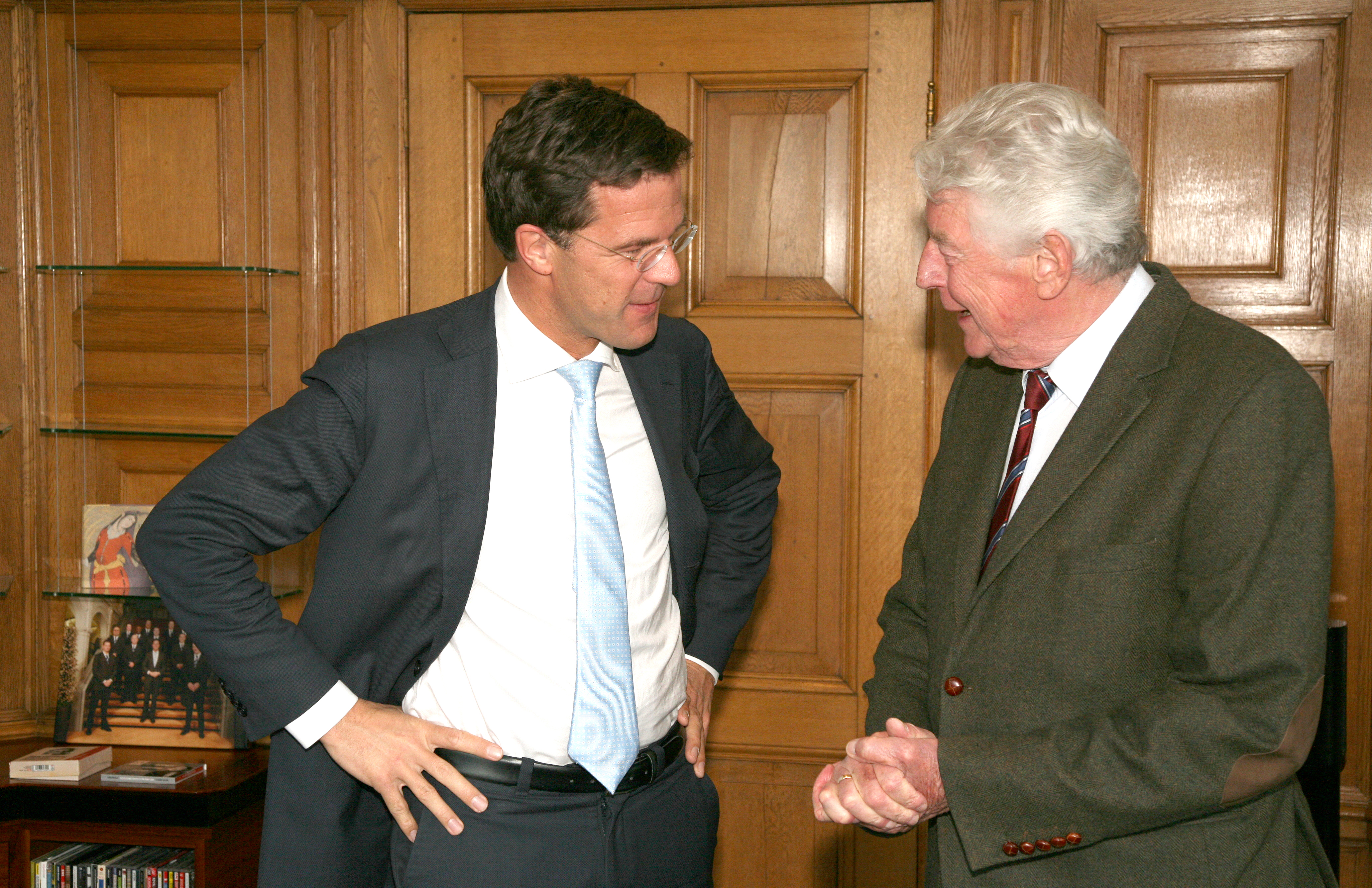 Minister-president Rutte wisselt in het Torentje van gedachten met oud-premier Kok.